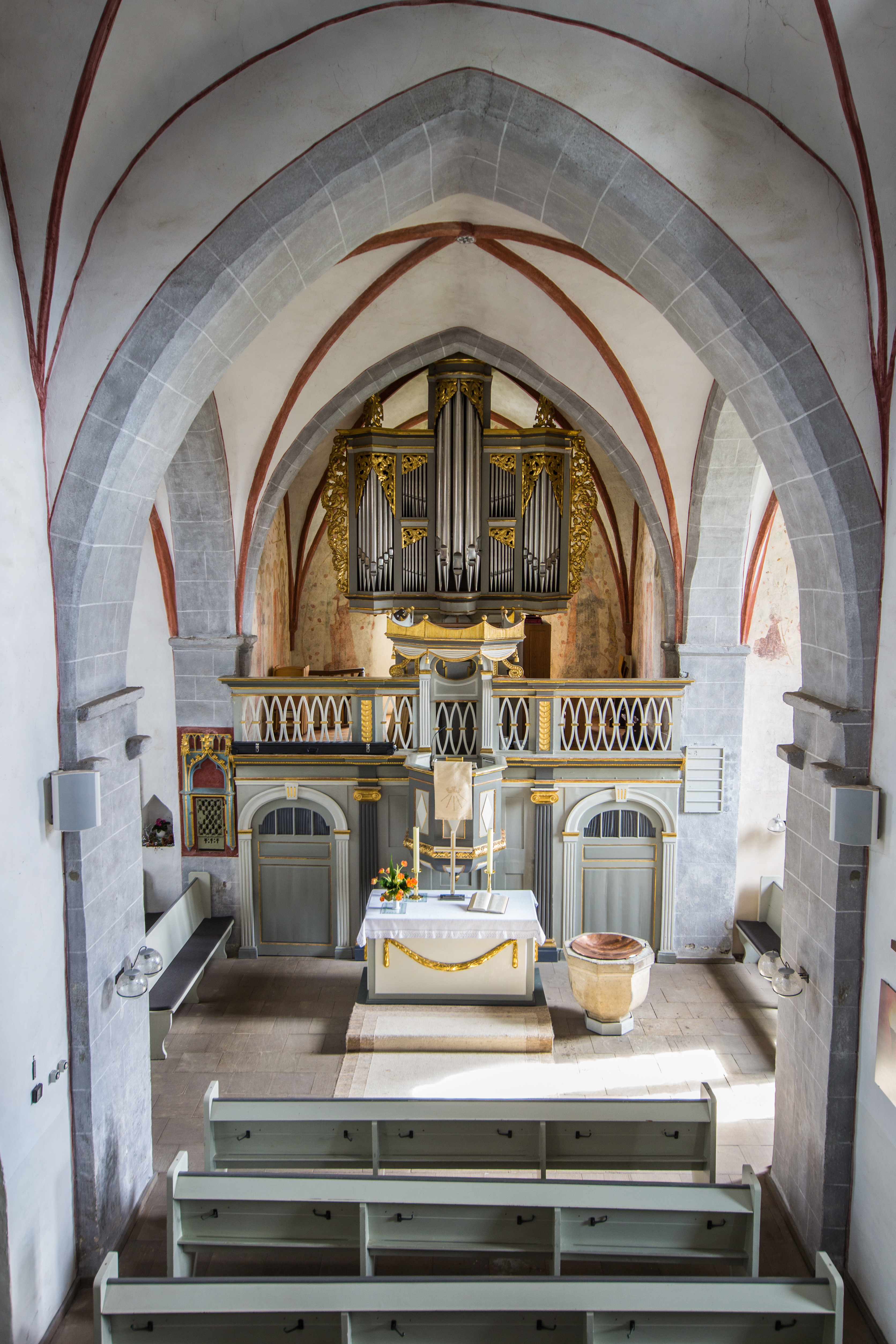 Innenansicht der evangelischen Kirche in Müllenbach.